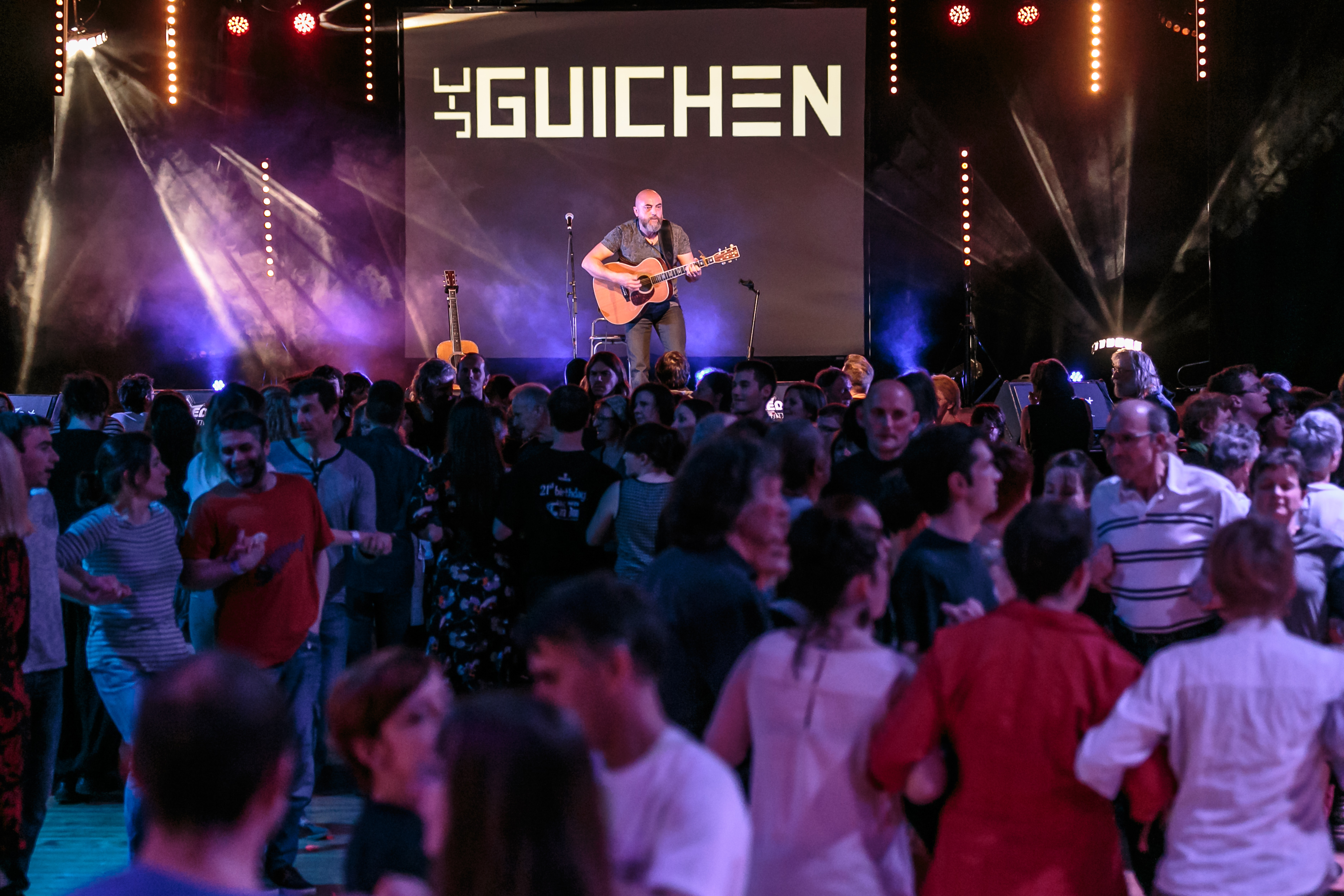 Jean-Charles Guichen lors du fest-noz Stered au parc des expositions Lango de Morlaix le 9 avril 2016.